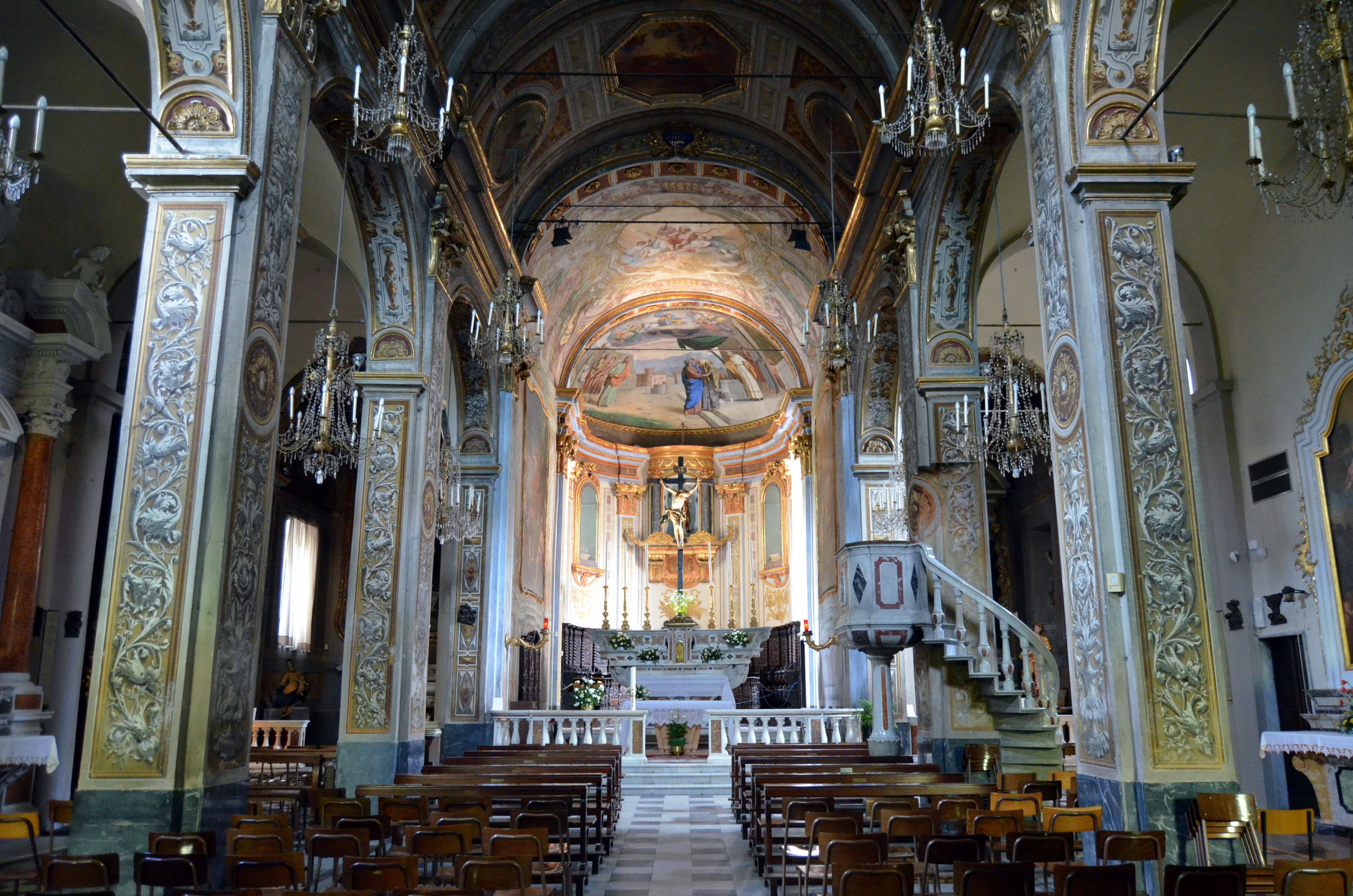 Tracce delle medievali mura di Levanto, Liguria, Italia Navata centrale della chiesa di San Giovanni Battista, Varese Ligure, Liguria, Italia